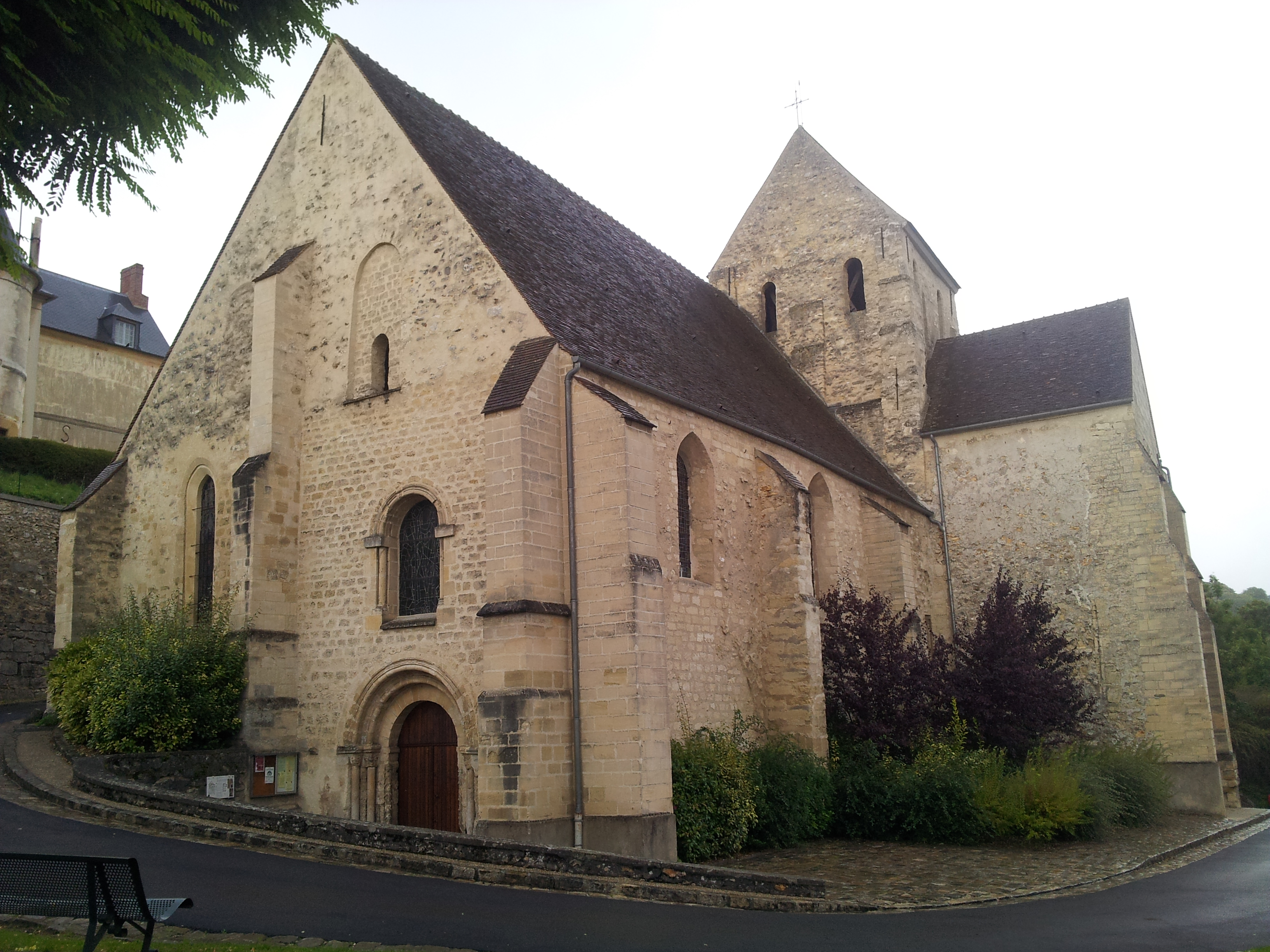 Église Saint-Pierre-aux-Liens de Vaux-sur-Seine .